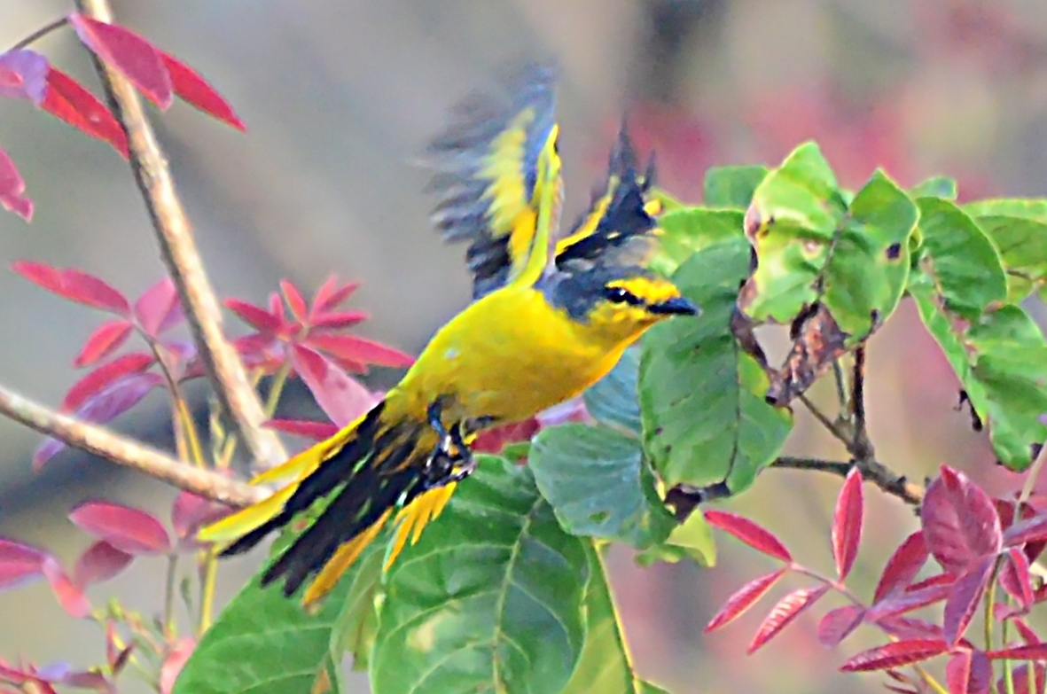 Scharlachmennigvogel Pericrocotus flammeus fliegend, Salim Ali Bird Sanctuary, Kerala, Indien